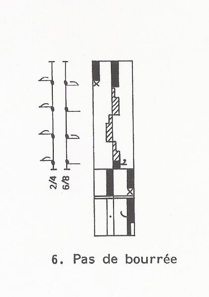 Labanotation signs 4